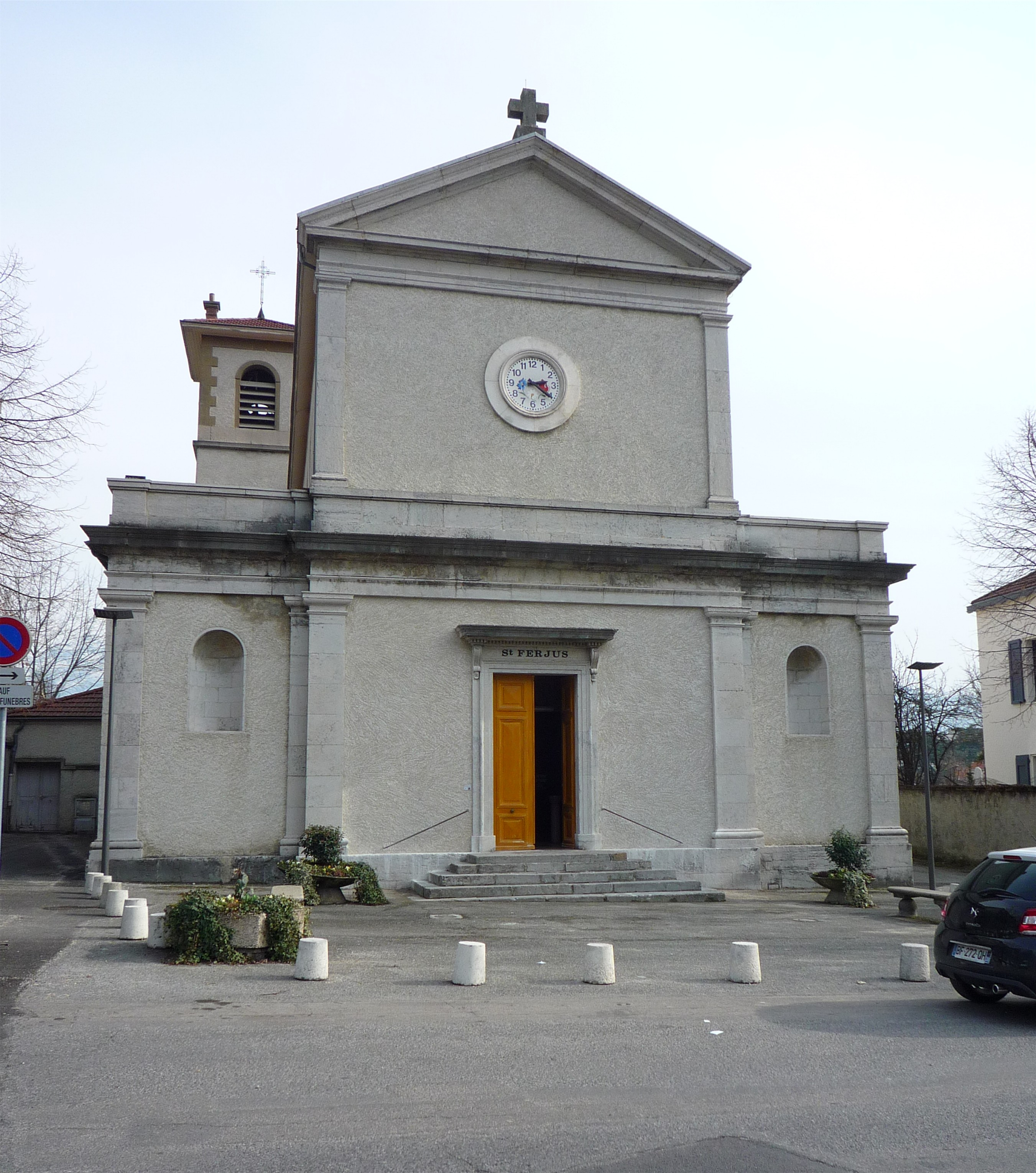 Église Saint-Ferjus (1845) située à La Tronche, près de Grenoble. Ferjus (ou saint Ferréol), quatorzième évêque de Grenoble, fut assassiné en raison de sa foi et pour raison politique, le 2 janvier 659.